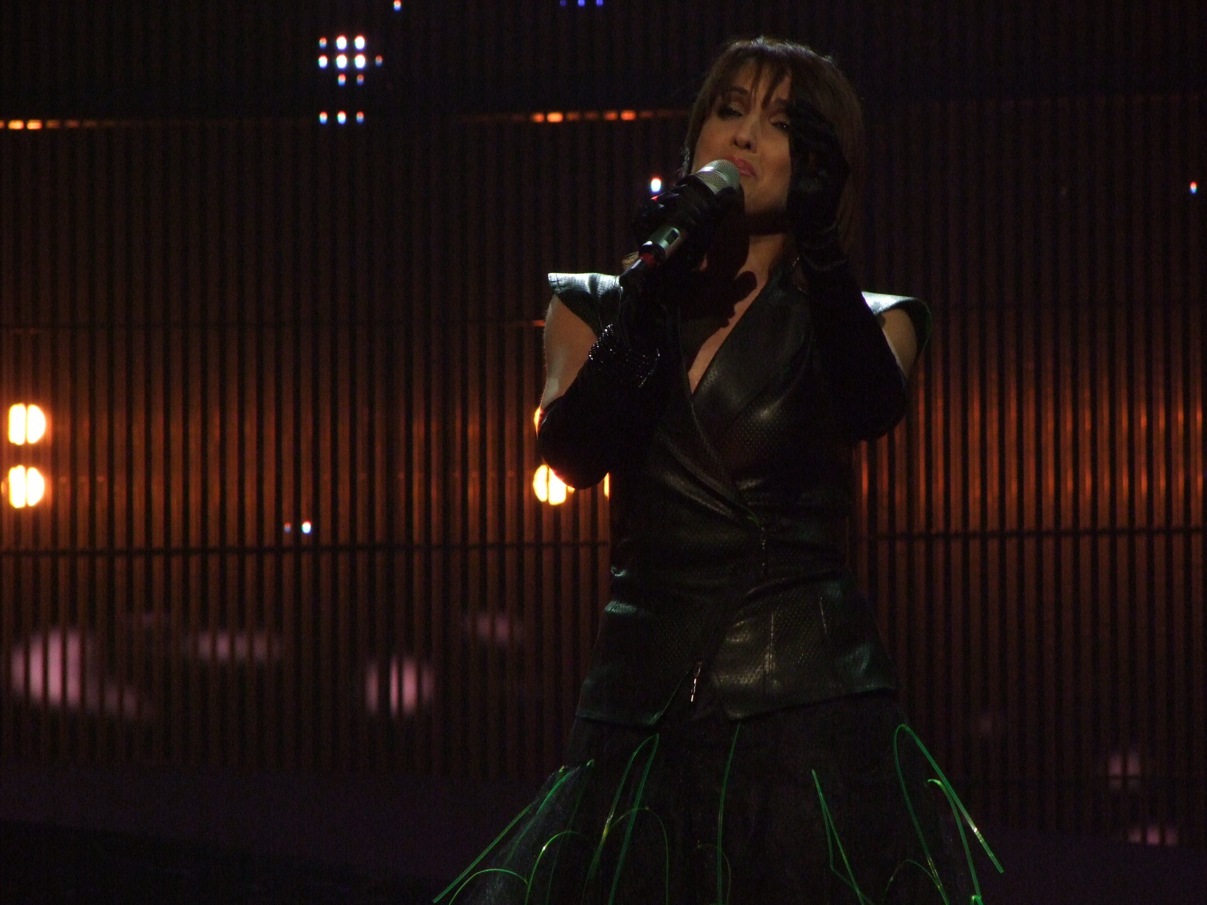 Semifinal 1 EUROVISION 2008